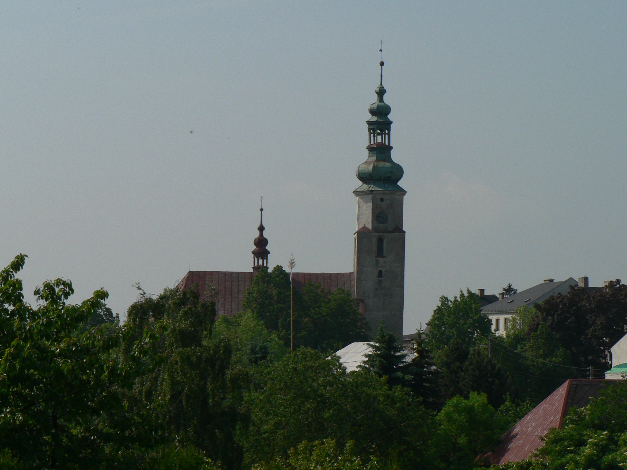 Kostel Narození Panny Marie (Andělská Hora)